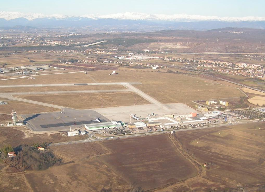 Autore: Mattiussi Fonte: Personale Descrizione: Veduta aerea